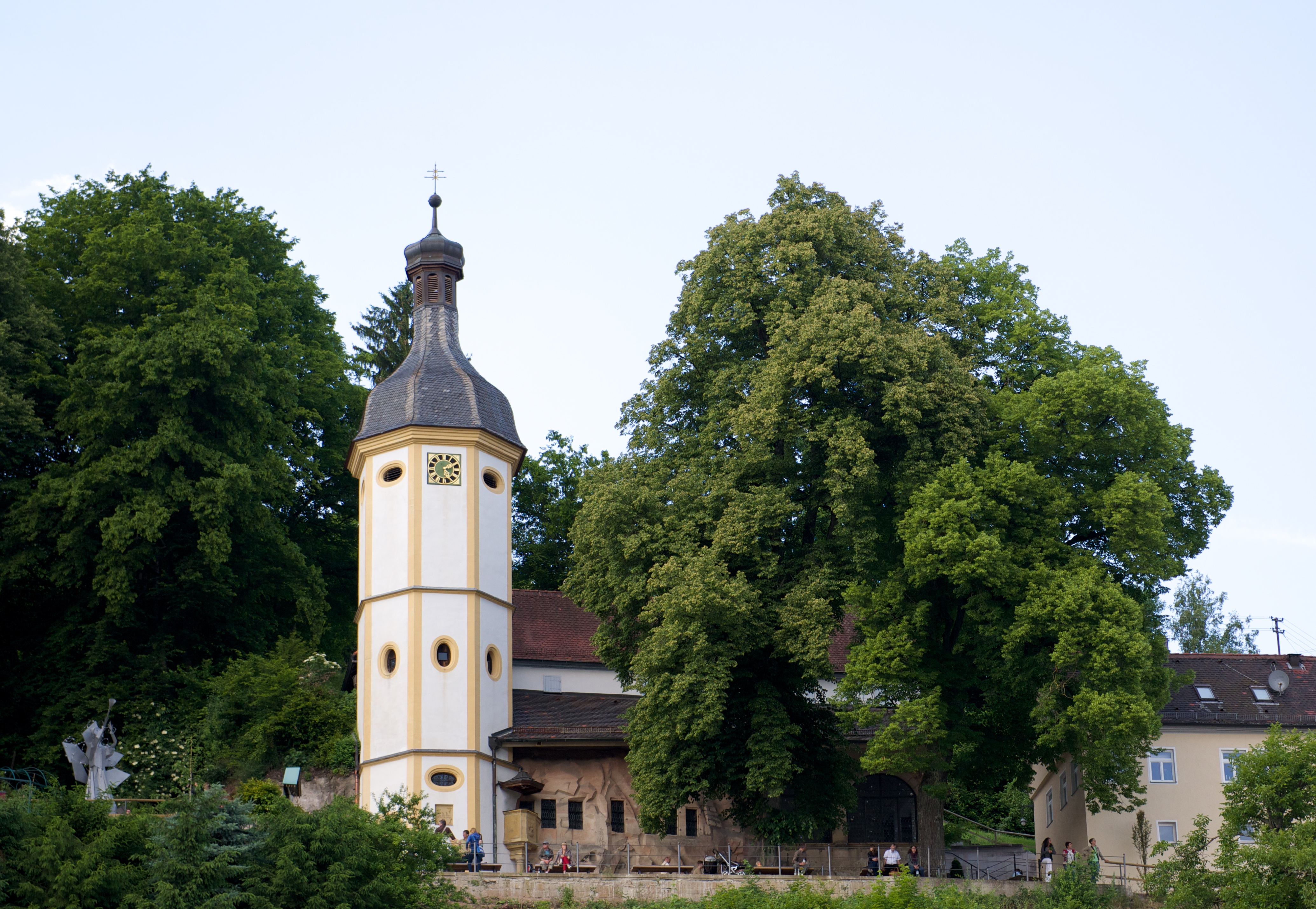 Salvatorkirche am Nepperberg in Schwäbisch Gmünd